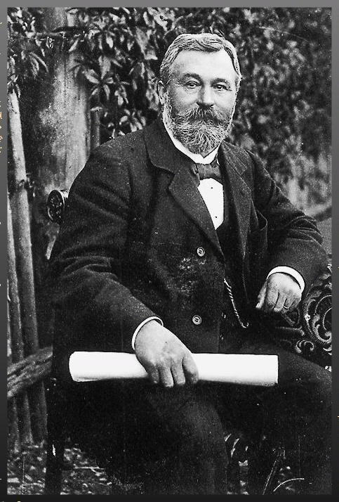 Otto Karl Friedrich Hetzer (*11.02.1846 - +18.01.1911)